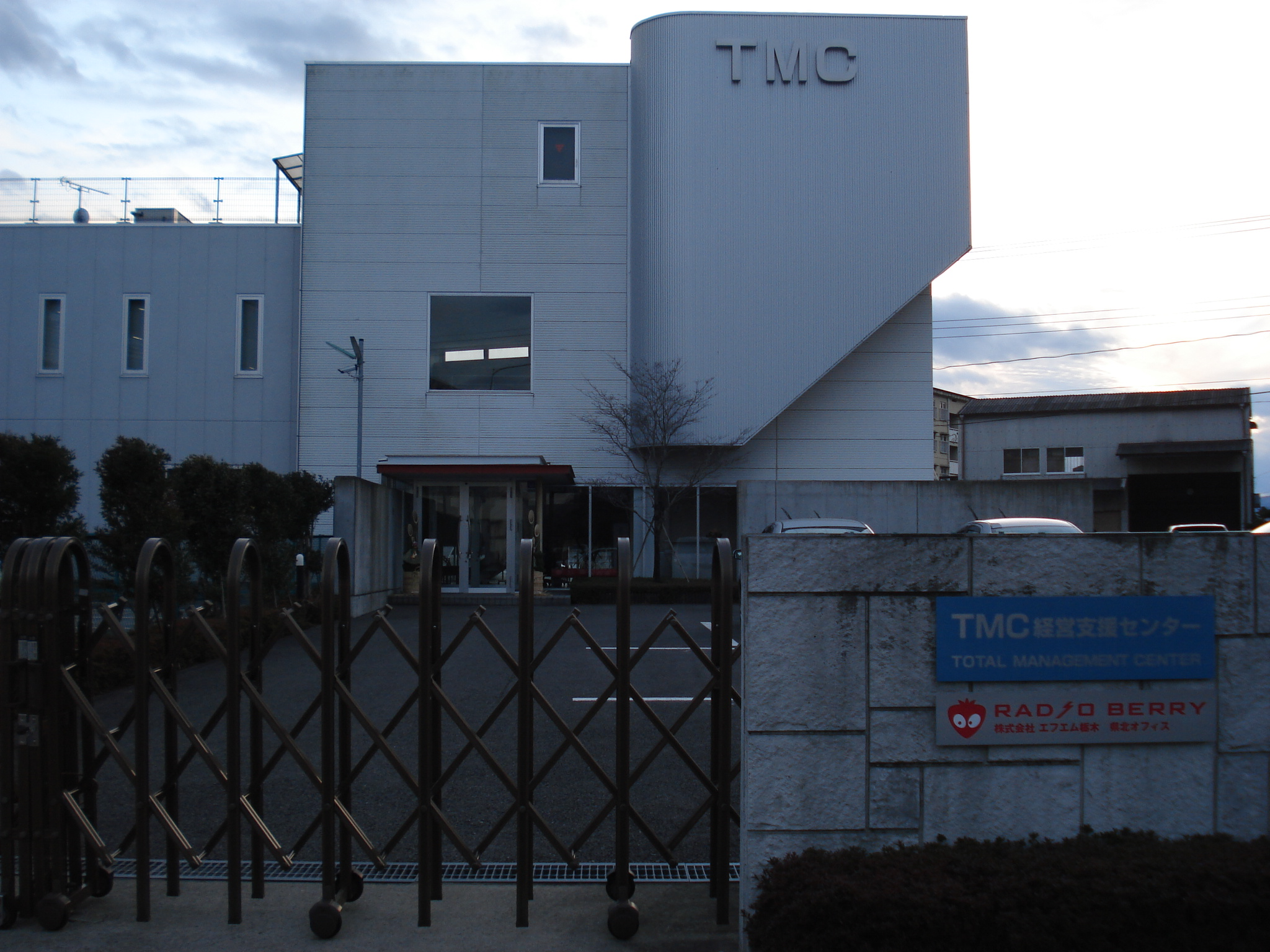 エフエム栃木 県北オフィス 栃木県那須塩原市大原間西